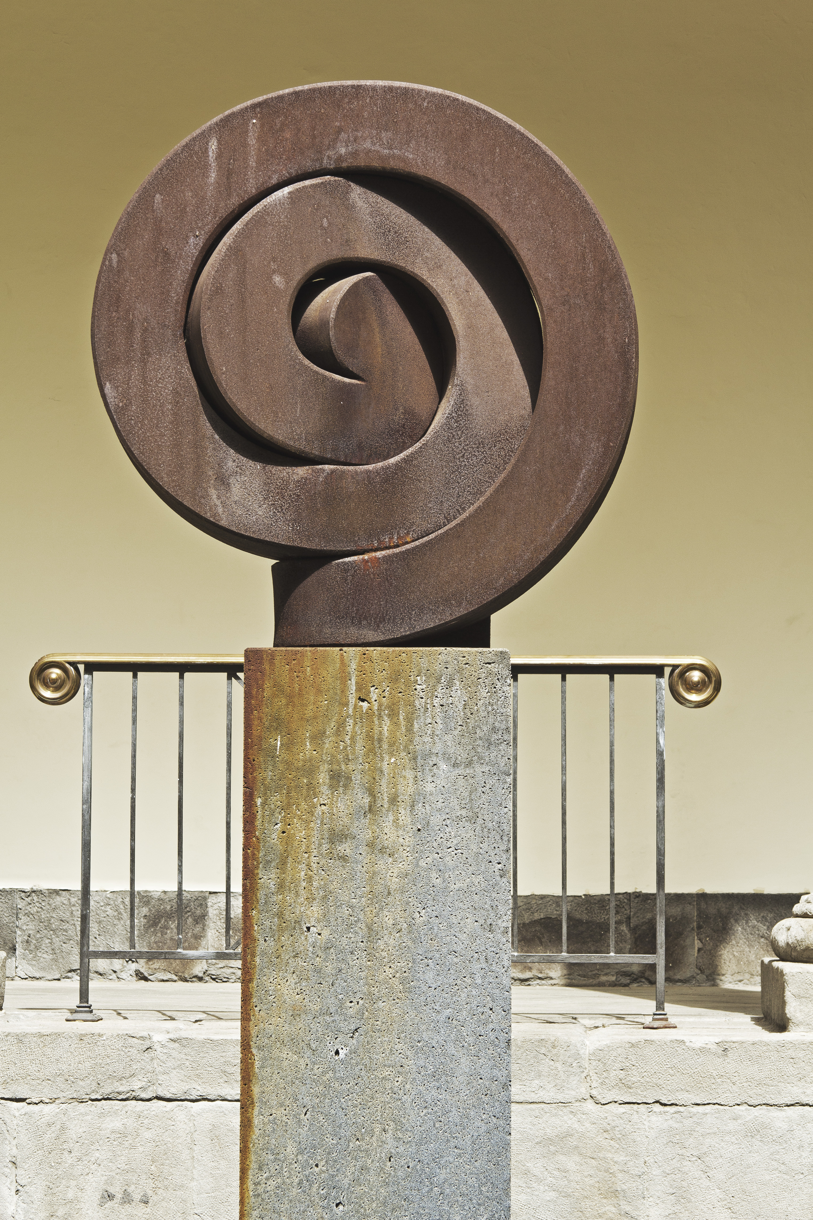 Plastik des Künstlers Martín Chirino vor dem Parlament der Kanarischen Inseln (Parlamento de la Comunidad autónoma de Canarias) in Santa Cruz de Tenerife.